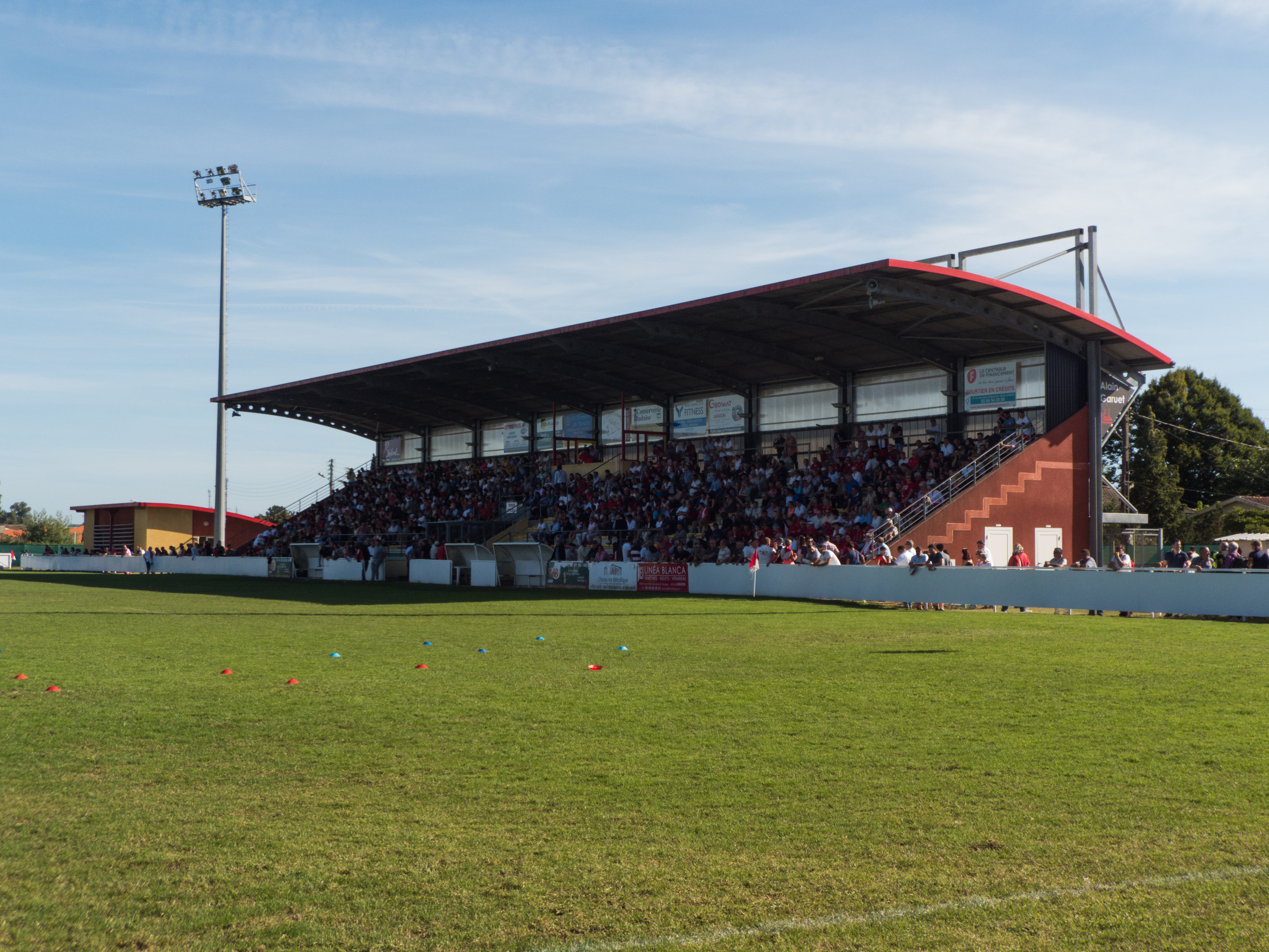 Fédérale 1 2018-2019 — 22 September 2018, stade Comberlin. Match between: Stade Langonnais — US Dax